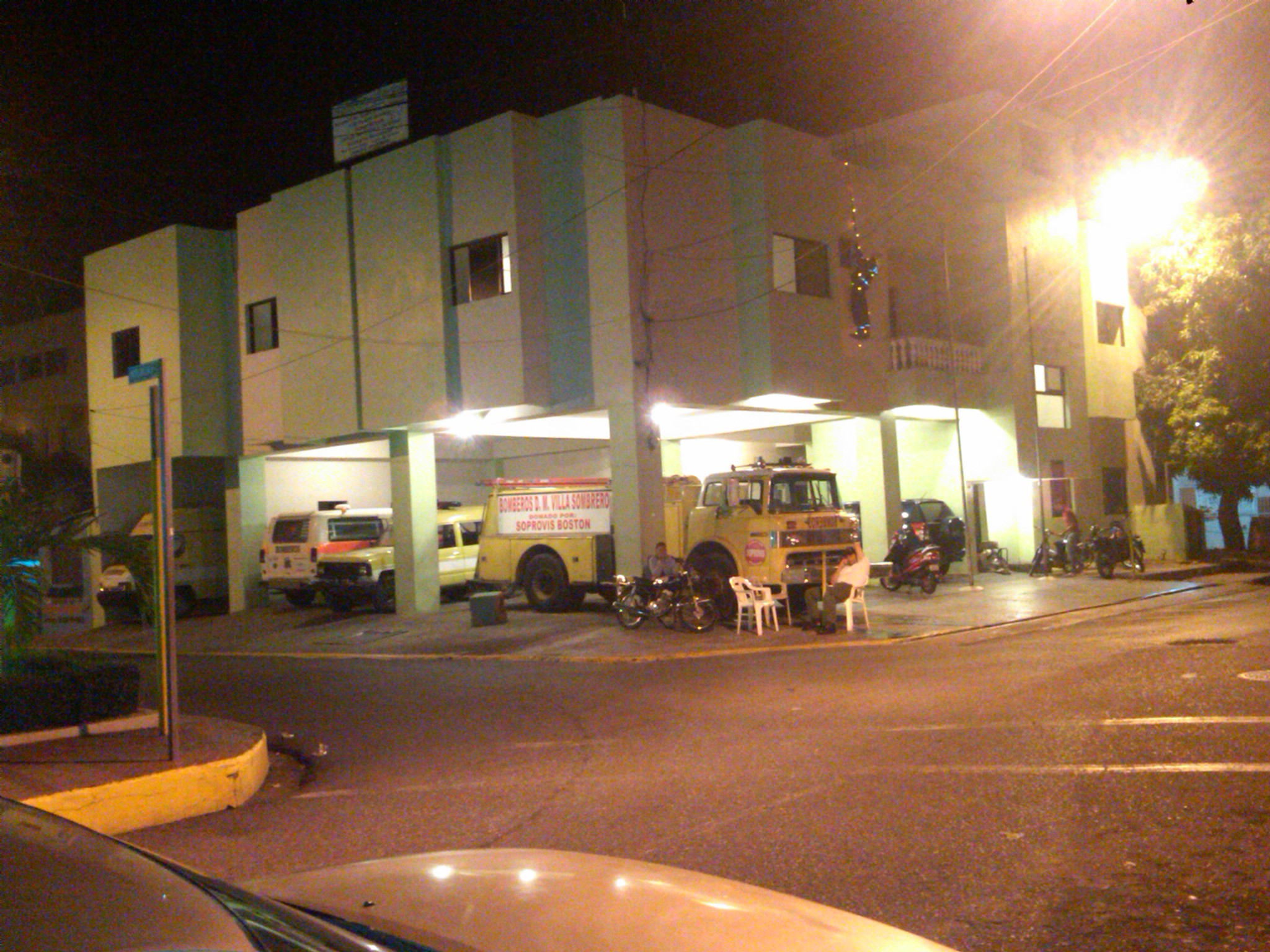 Cuartel de Bomberos Manuel Enríquez Torres (cabo torres)